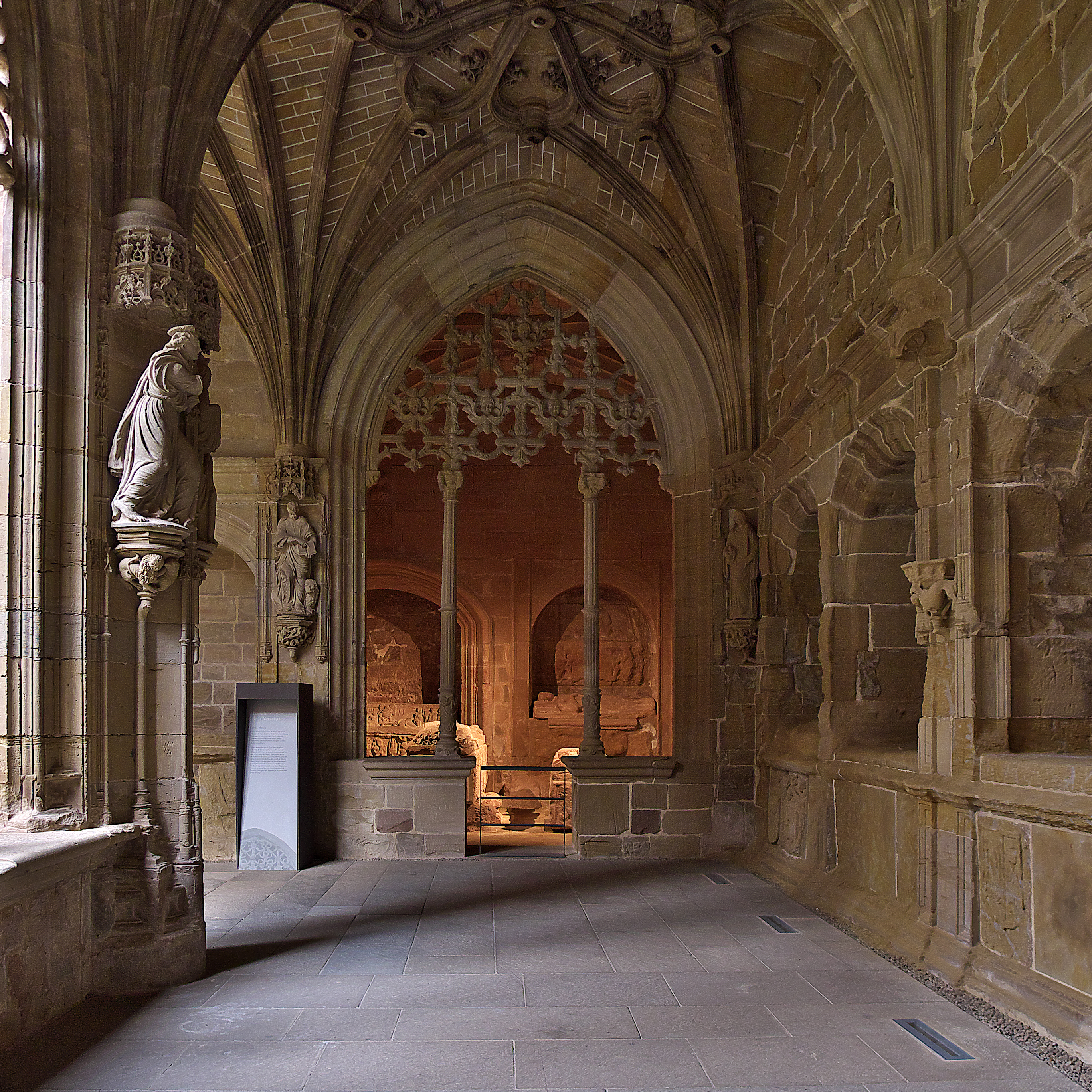 Galería occidental del claustro del Monasterio de Santa María la Real de Nájera. Capilla funeraria de doña Mencía López de Haro, reina consorte de Portugal.